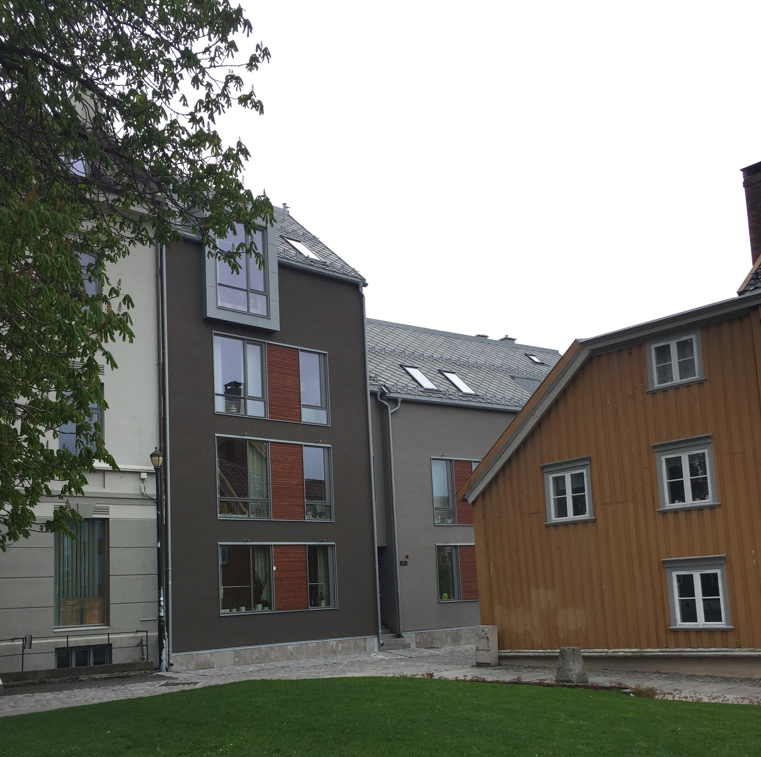 Presidentveita 3, Trondheim. Boligbygg, infill-bebyggelse. Vant Trondheim kommunes byggeskikkpris 2014